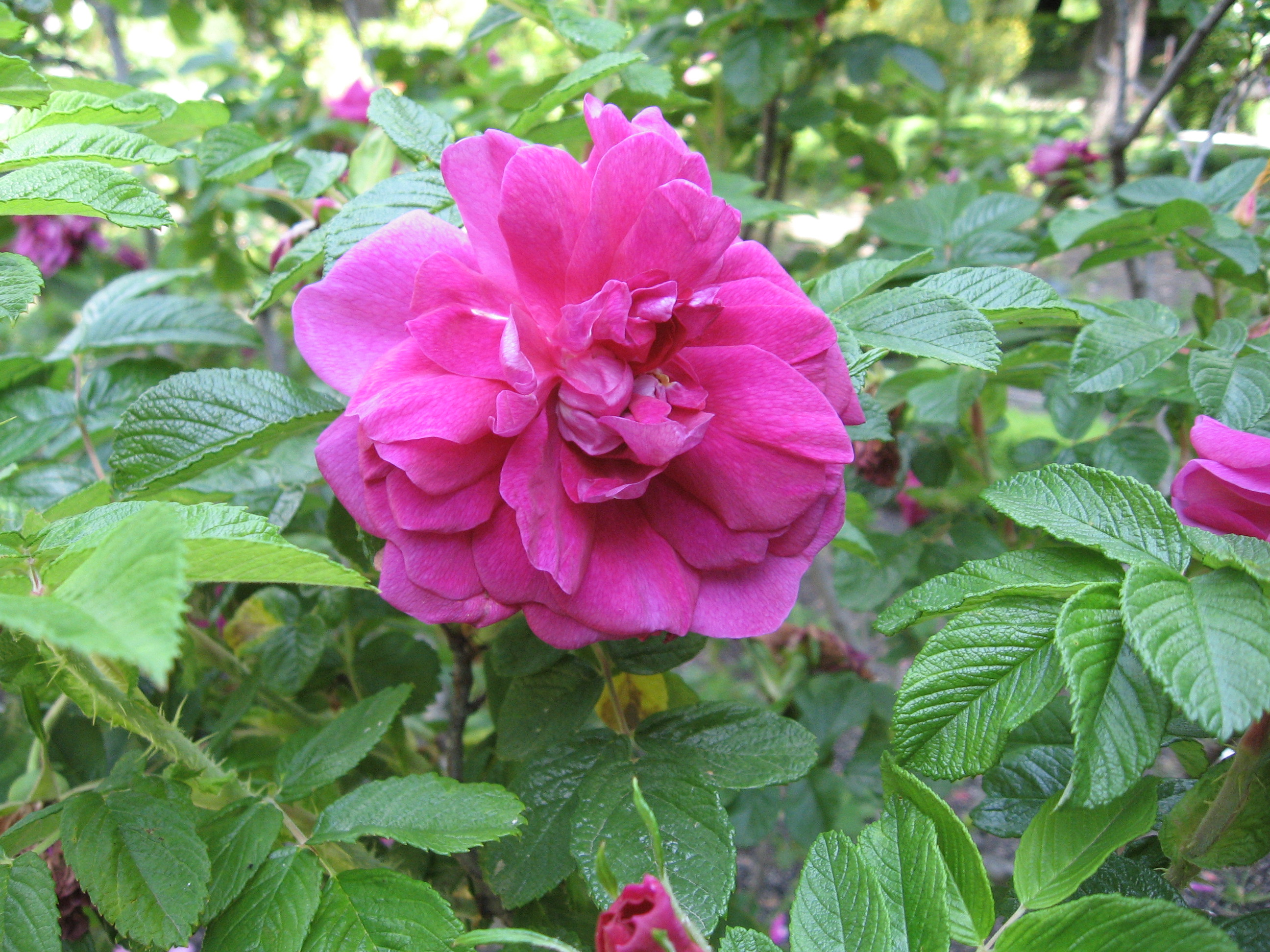 Rosa 'Hansa'. Real Jardín Botánico de Madrid.